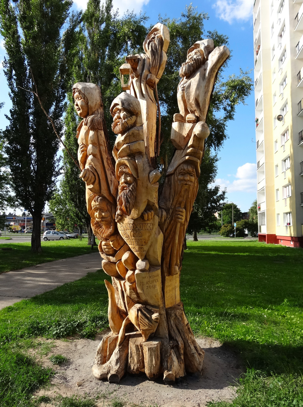 Rzeźba drewniana na osiedlu Szwederowo w Bydgoszczy